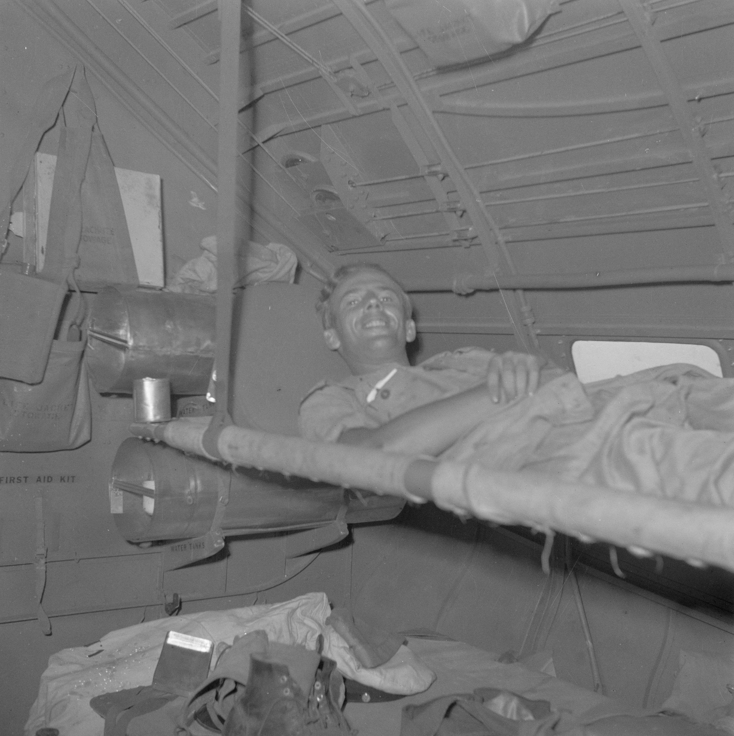 Collectie / Archief : Fotocollectie Van de Poll Reportage / Serie : Oorlogsvrijwilligers in Malakka en Indonesië Beschrijving : Een gewonde militair ('de Witte') aan boord van het Catalina-watervliegtuig dat hem van Banka naar Batavia zal brengen Datum : 1946 Locatie : Indonesië, Nederlands-Indië Trefwoorden : militairen, watervliegtuigen Instellingsnaam : Rode Kruis Fotograaf : Poll, Willem van de Auteursrechthebbende : Nationaal Archief Materiaalsoort : Negatief (zwart/wit) Nummer archiefinventaris : bekijk toegang 2.24.14.02 Bestanddeelnummer : 255-6975